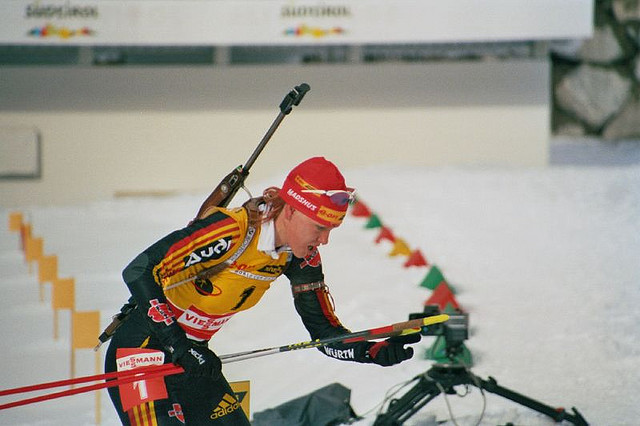 Kati Wilhelm